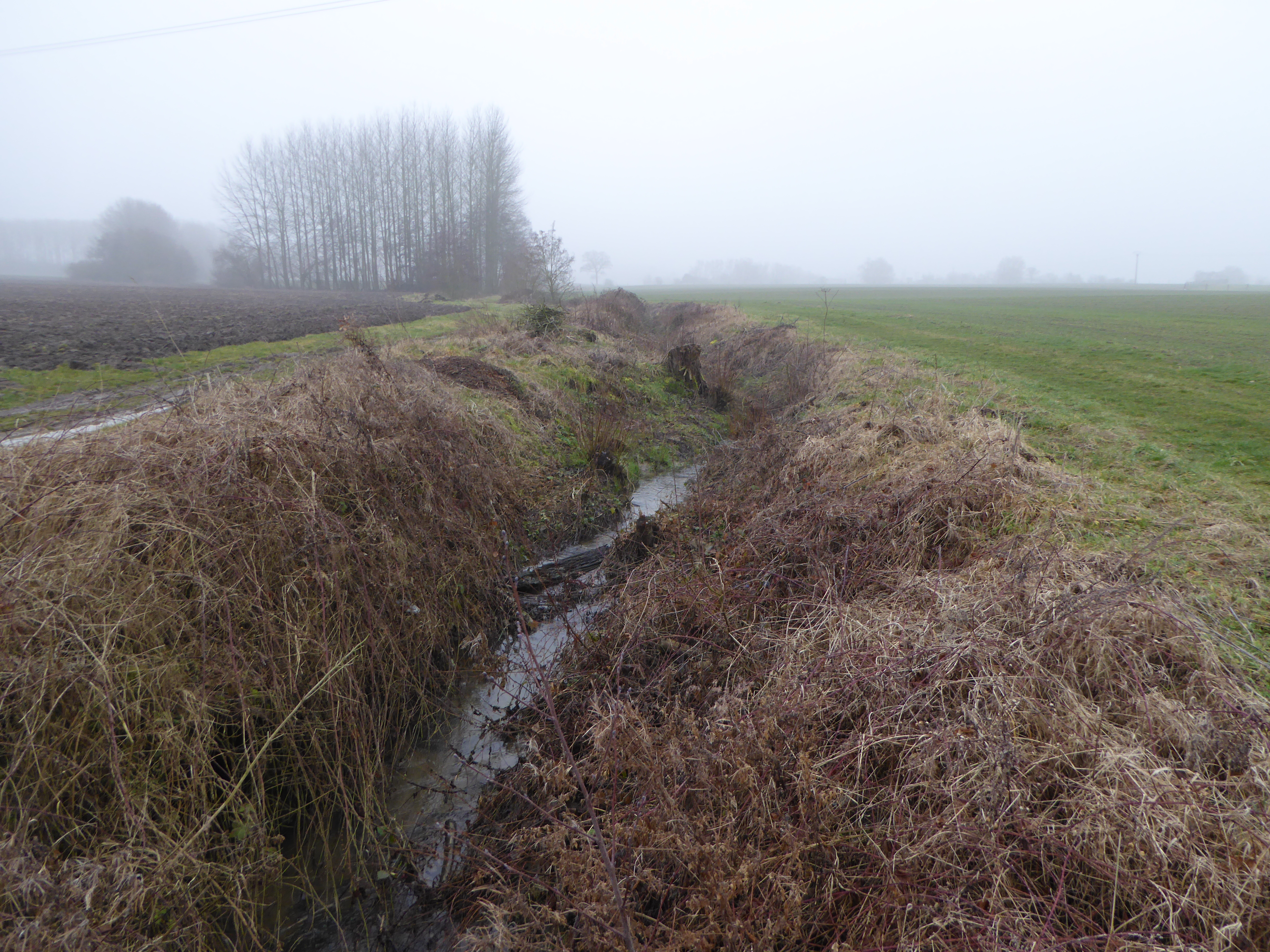 courant du Pont de Beuvry au Pont de Cumont Moncheaux, Nord.- France